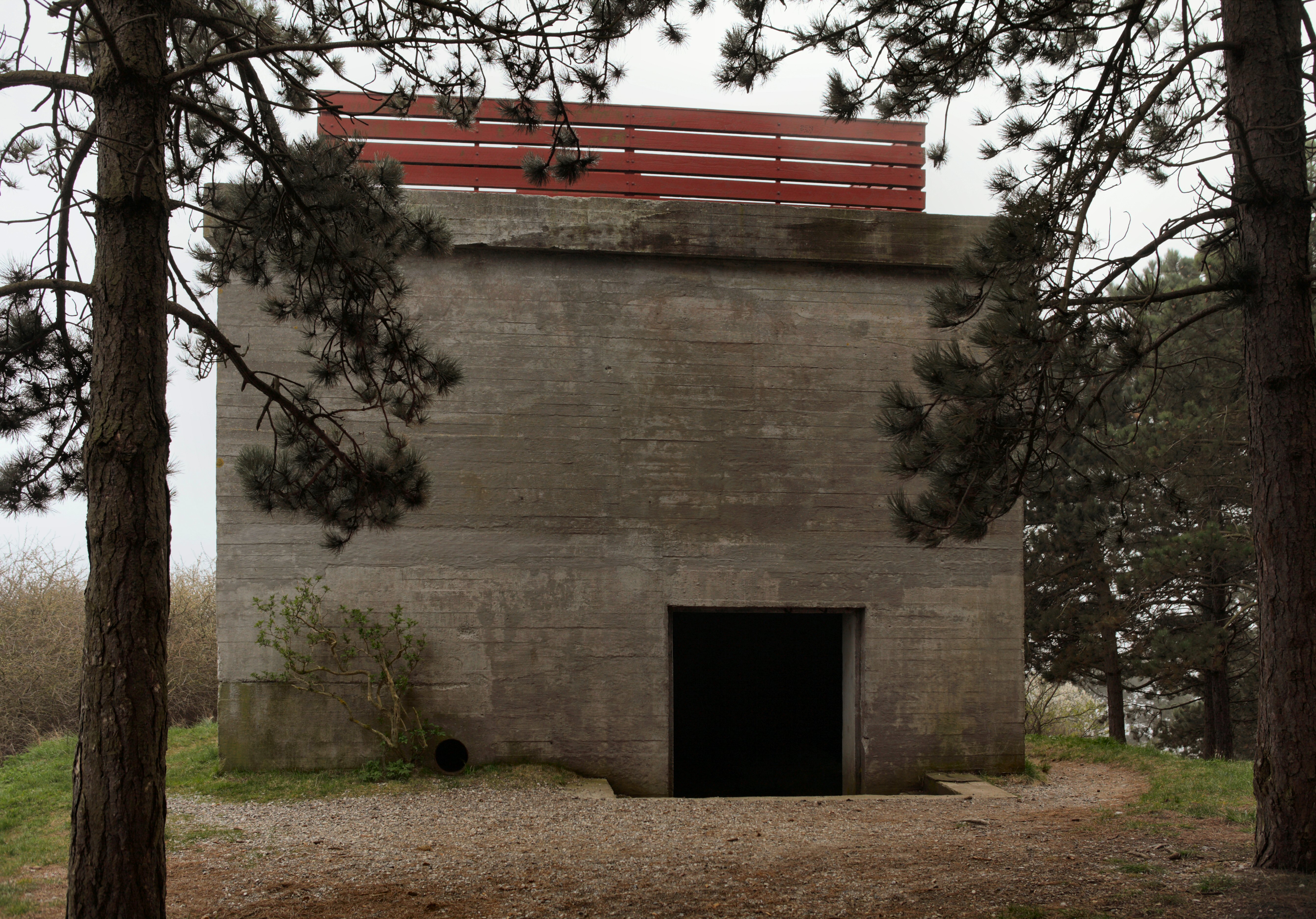 Tyskertårnet på Helgenæs lidt øst for Sletterhage Fyr - siden mod land